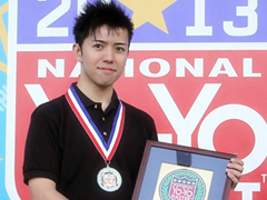 ナショナルマスターアワード受賞時のBLACK（パフォーマー）の写真です。